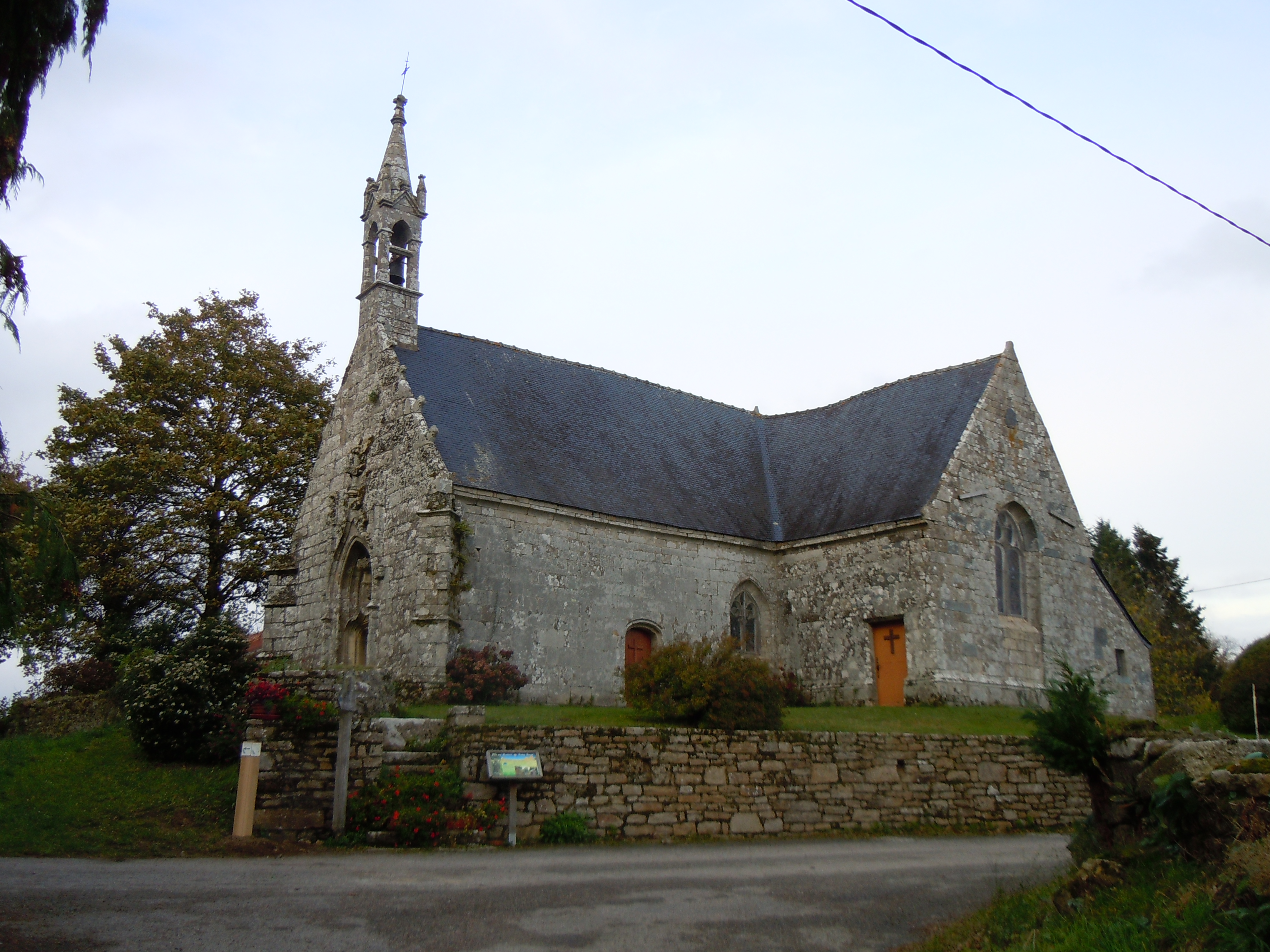 vue générale prise du sud de la chapelle Saint-Germain de Séglien (Morbihan)